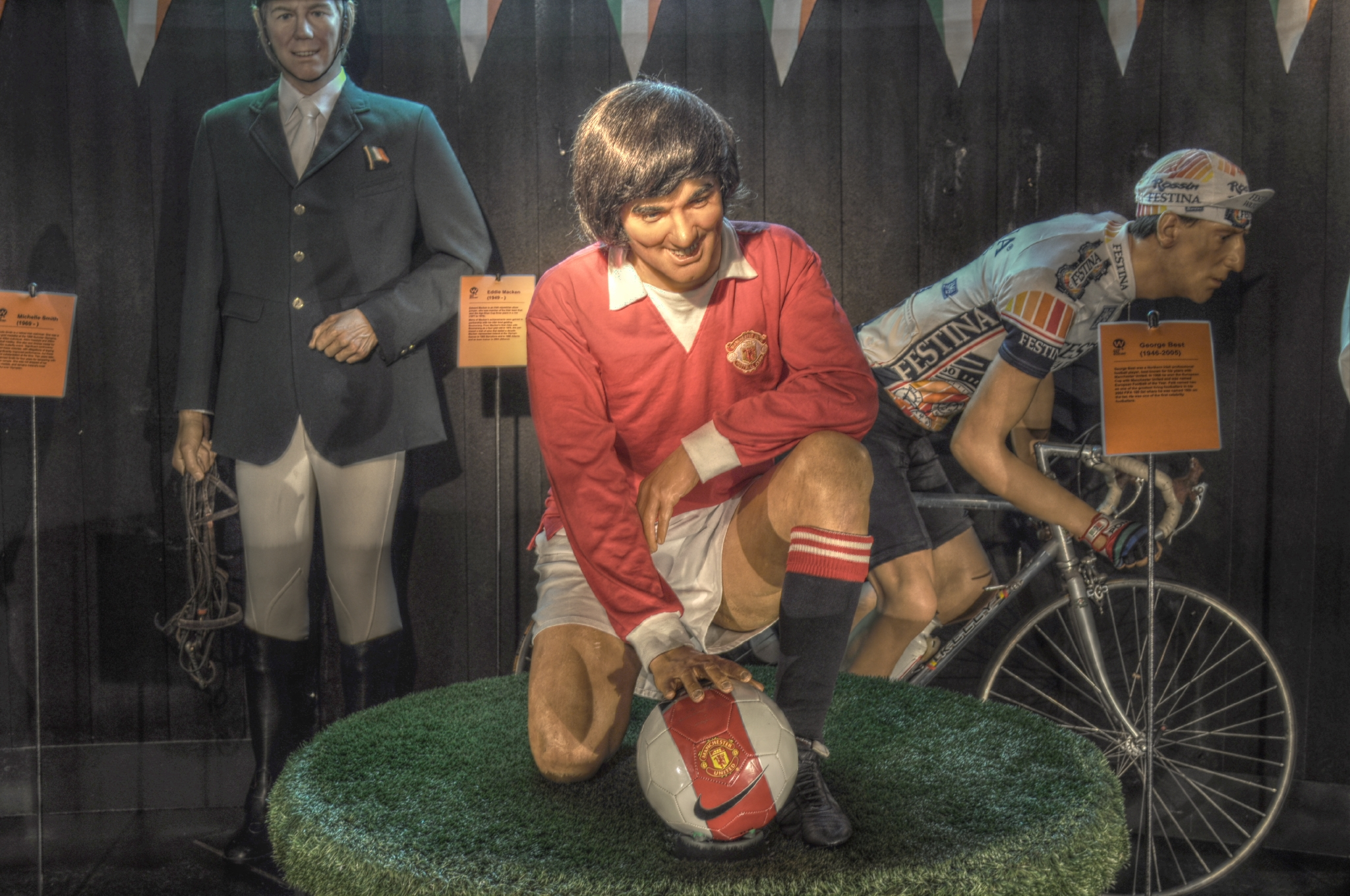 Camera: Nikon D5000 Luminance HDR, Mantiuk '06